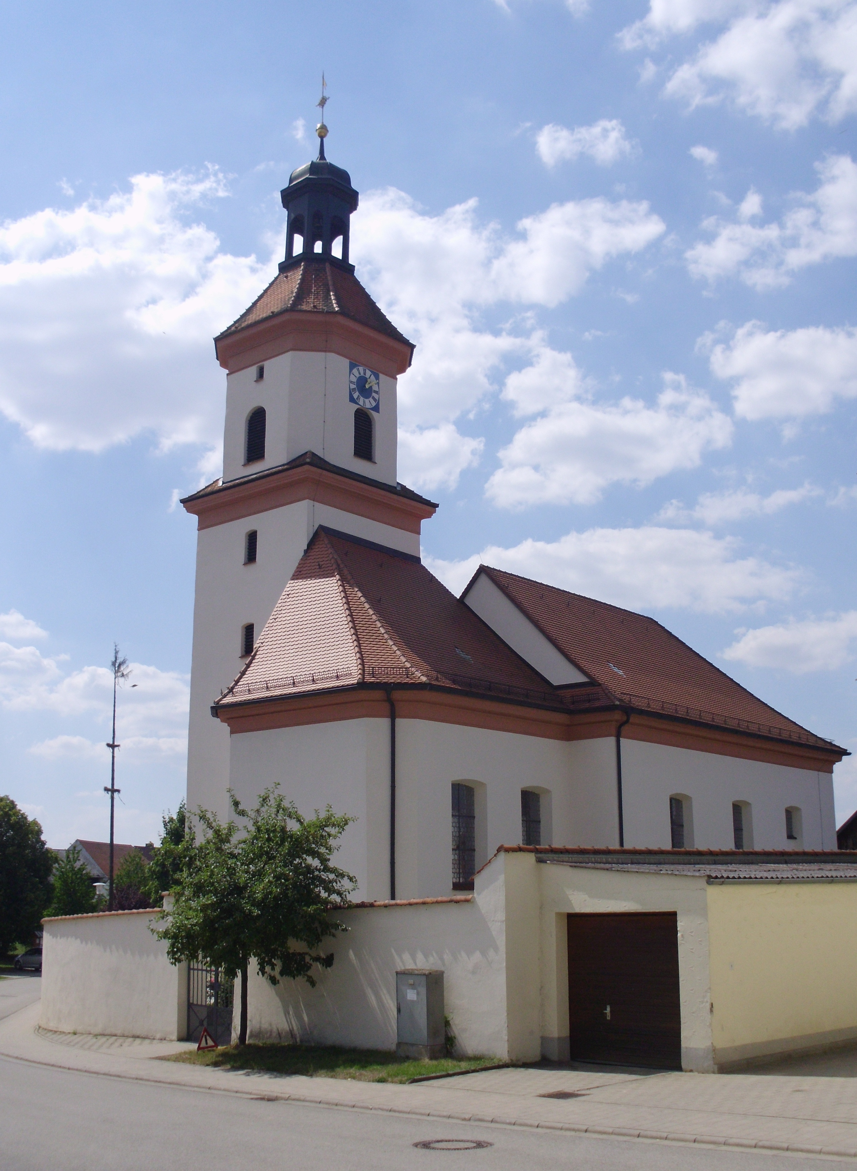 Euerwang, Ortsteil von Greding im mittelfränkischen Landkreis Roth in Bayern, Kath. Filialkirche St. Martin